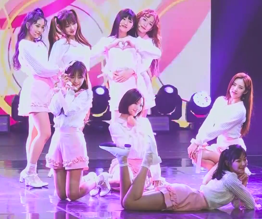 두 번쩨 미니앨범 ‘To. Day’ 발매 기념 쇼케이스